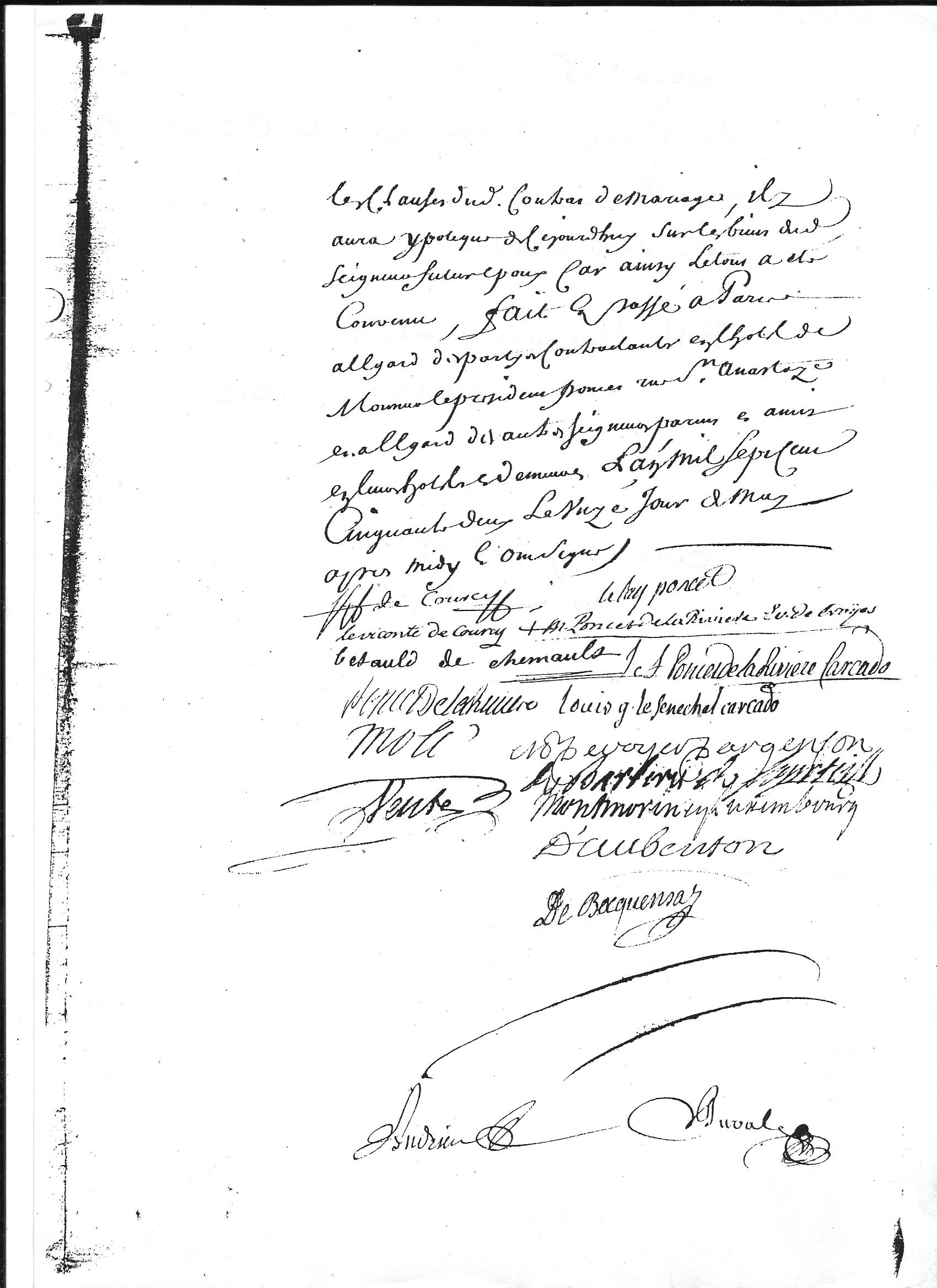 acte de mariage